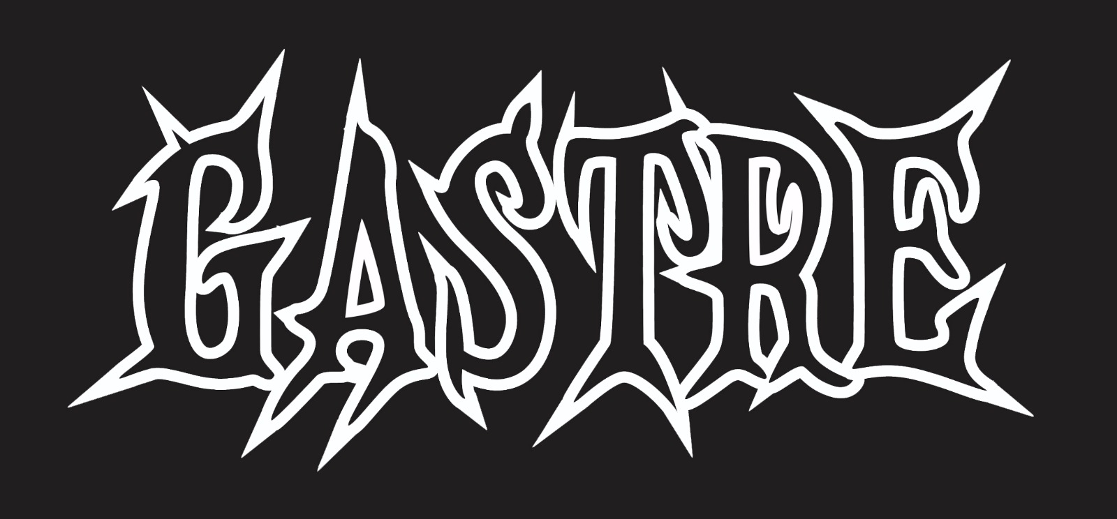 Gastre band logo.